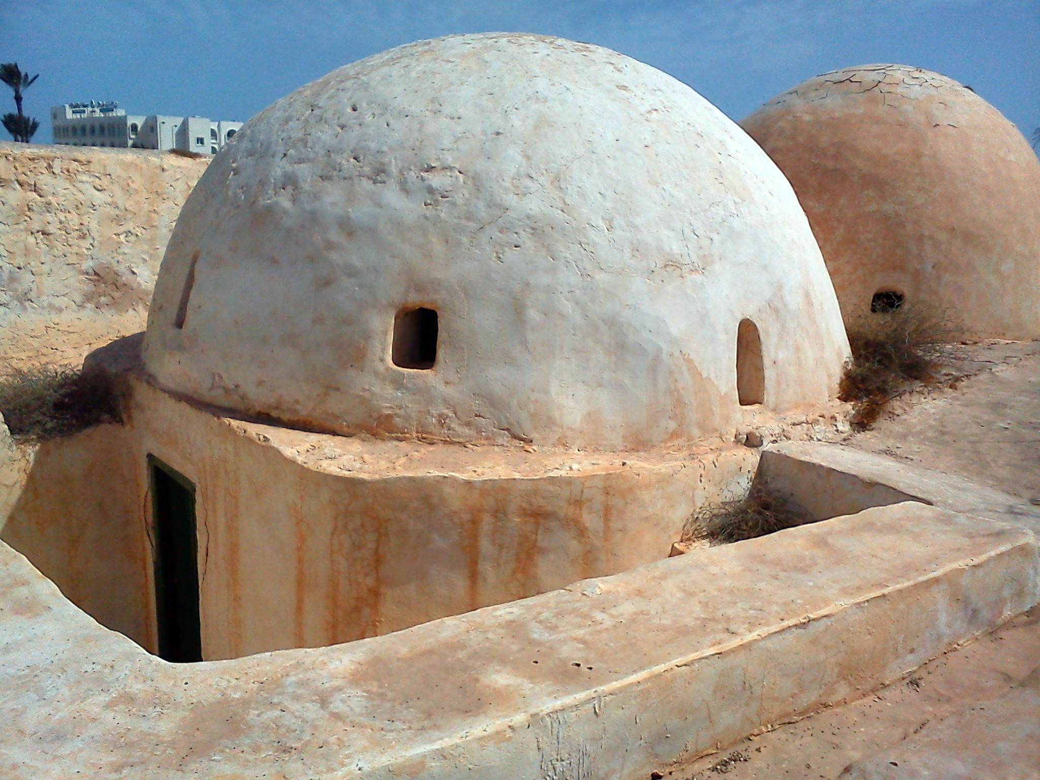 Intérieur de la mosquée Sidi Zekri